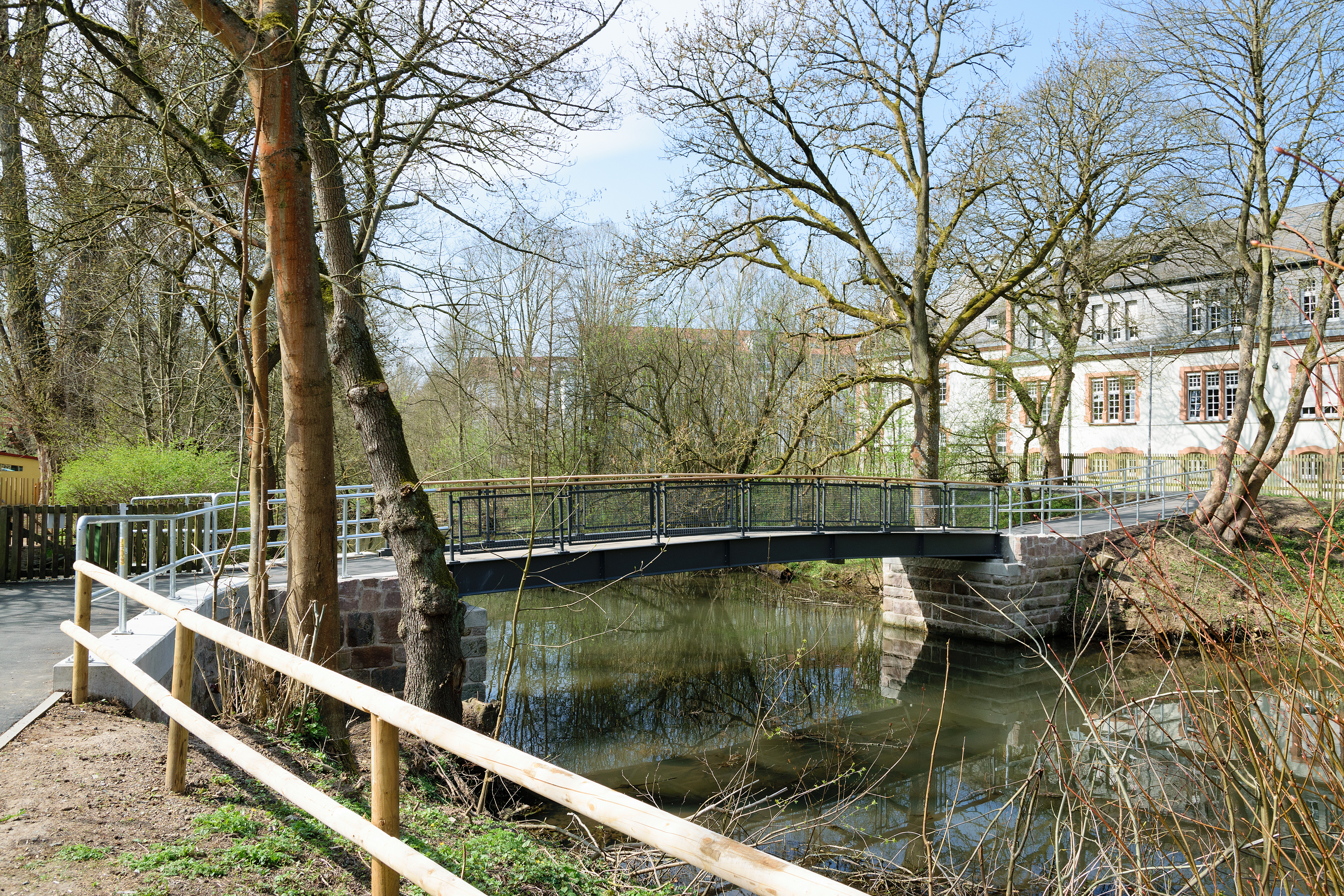 Steg ("Bückingsdammbrücke"?) über den Mühlgraben in Marburg, erbaut im Jahr 2015